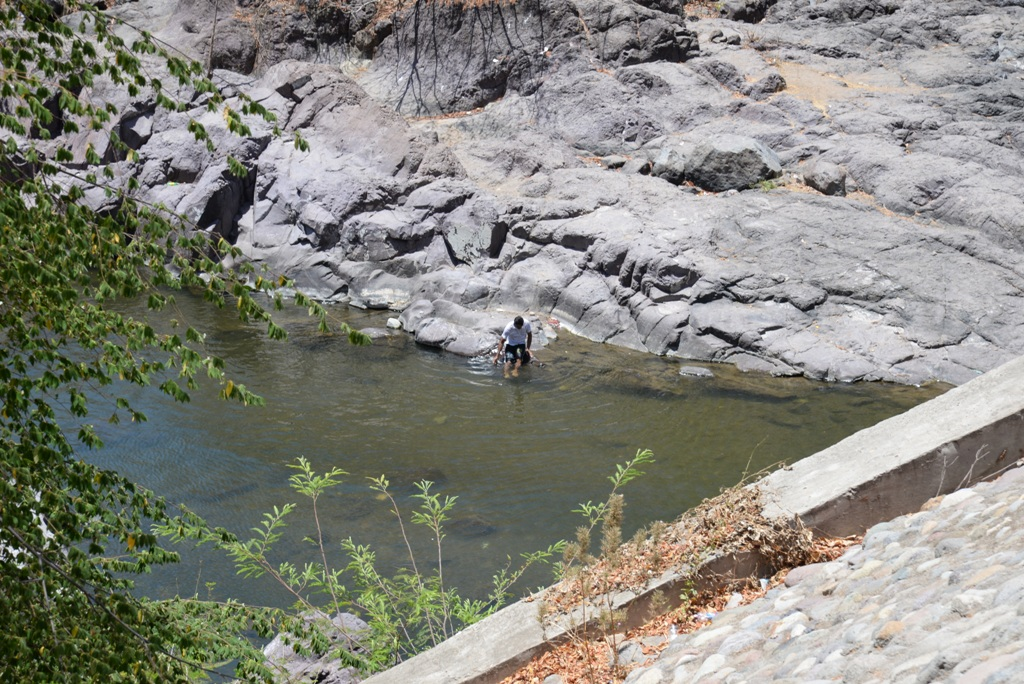 Rio Grande, El Sauce, Nicaragua